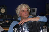 photo Xavier LEGASA